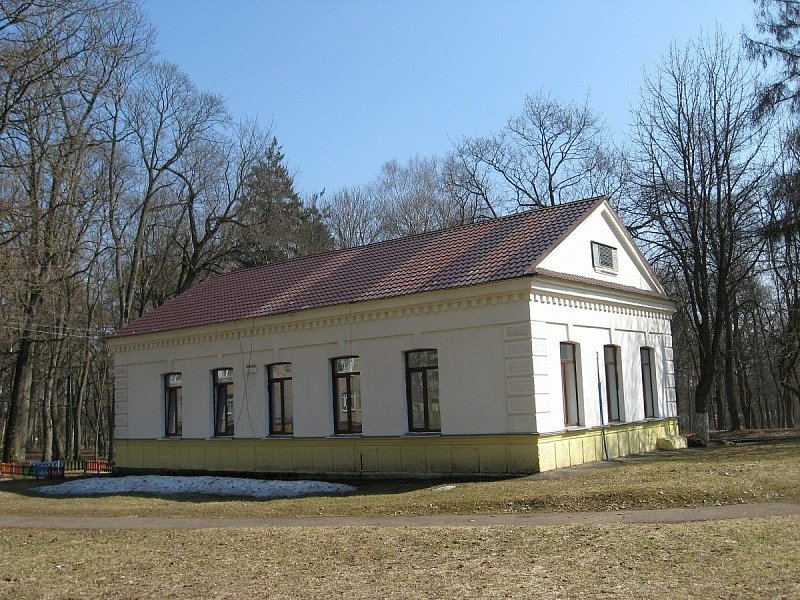 Станькава. Флігель